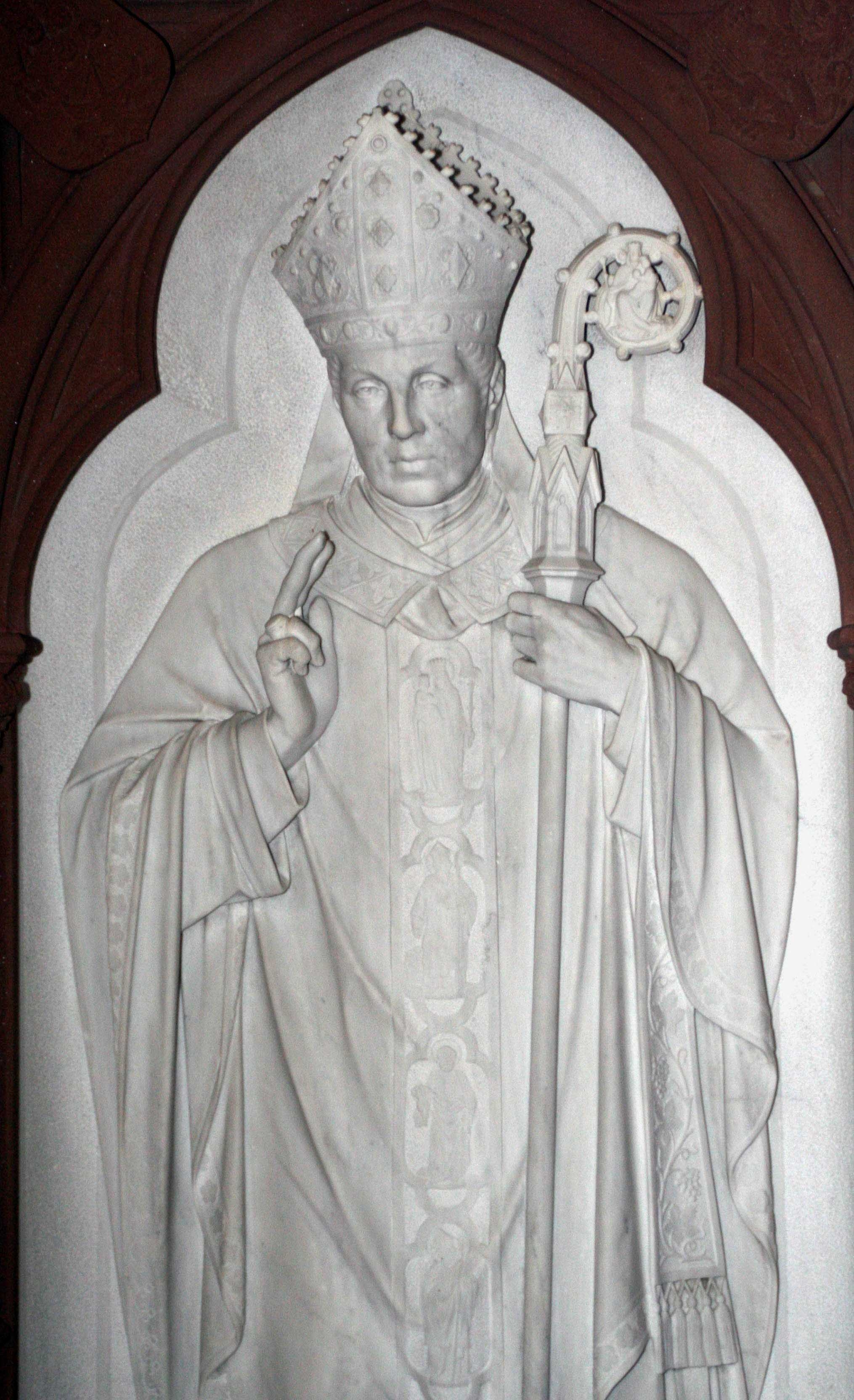 Grabstein von Bischof Nicolas Adams in der Kapelle Glacis in Luxemburg - Stadt